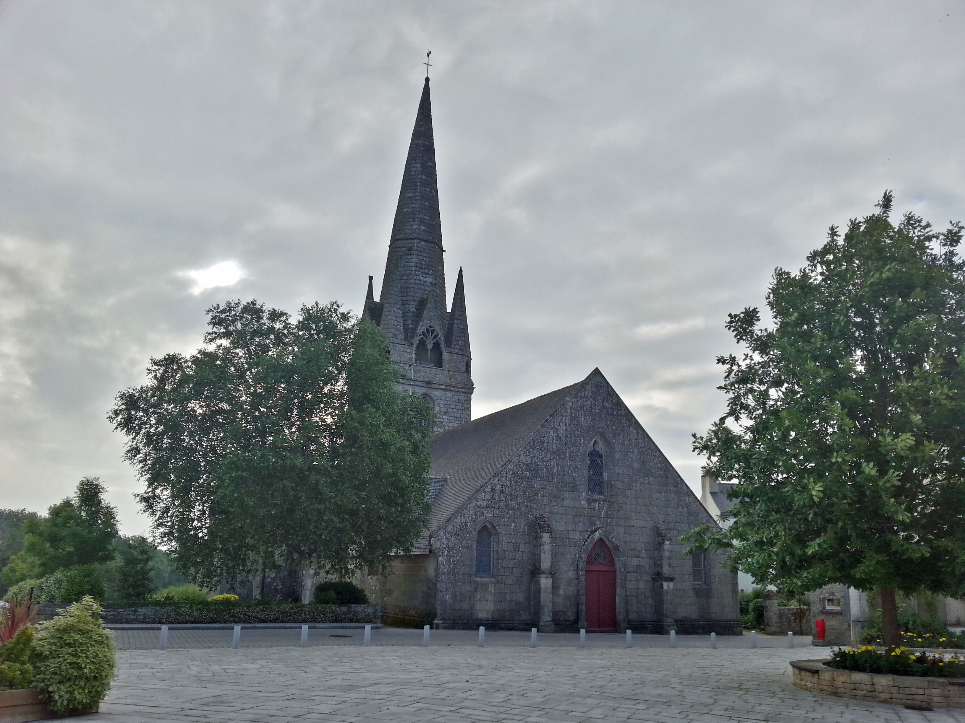 Église Notre-Dame de Rosporden